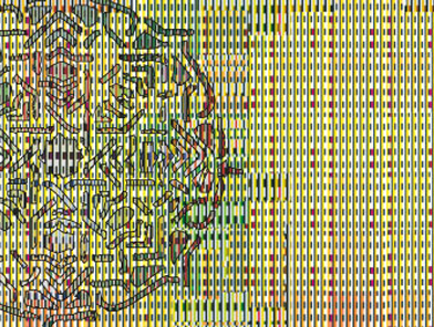 Logo